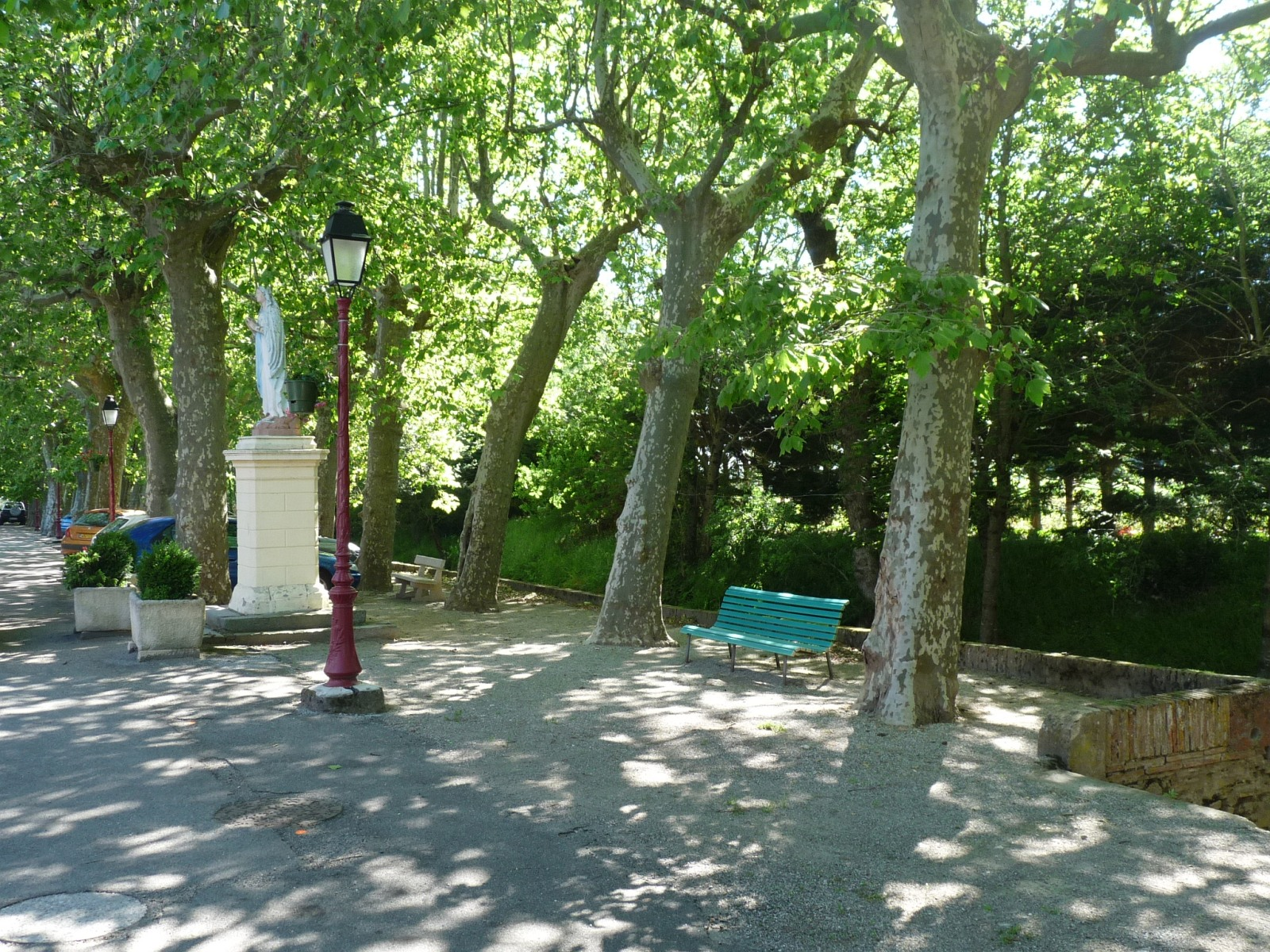 Place le long du Laudot, Vaudreuille, Haute-Garonne, France